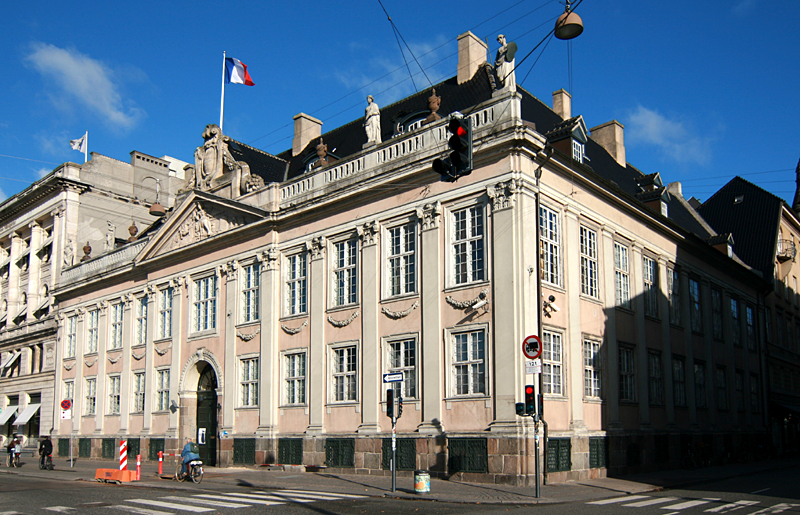 Thotts Palæ, Kongens Nytorv 4, København. Bygget 1680. I dag Frankrigs ambassade i Danmark.